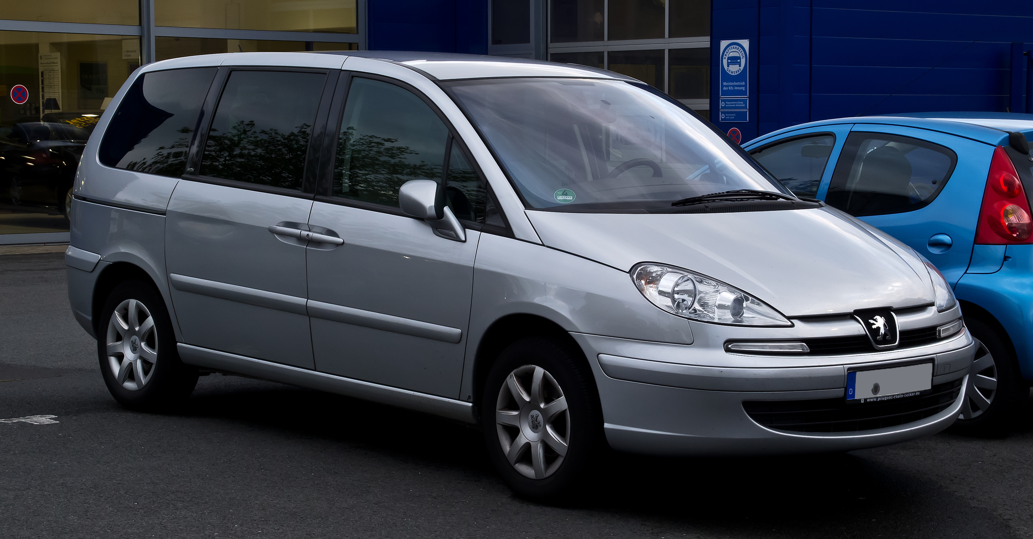 Peugeot 807